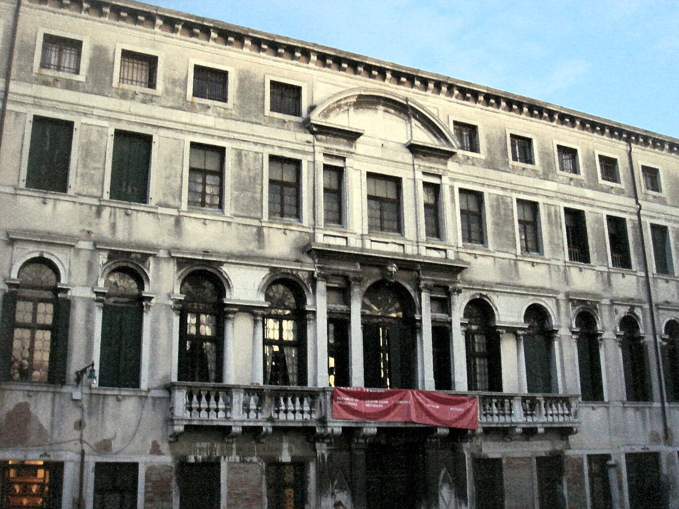 Venezia: Ca' Zenobio degli Armeni, facciata sul rio del Soccorso. Sony Cyber-shot DSC-T7